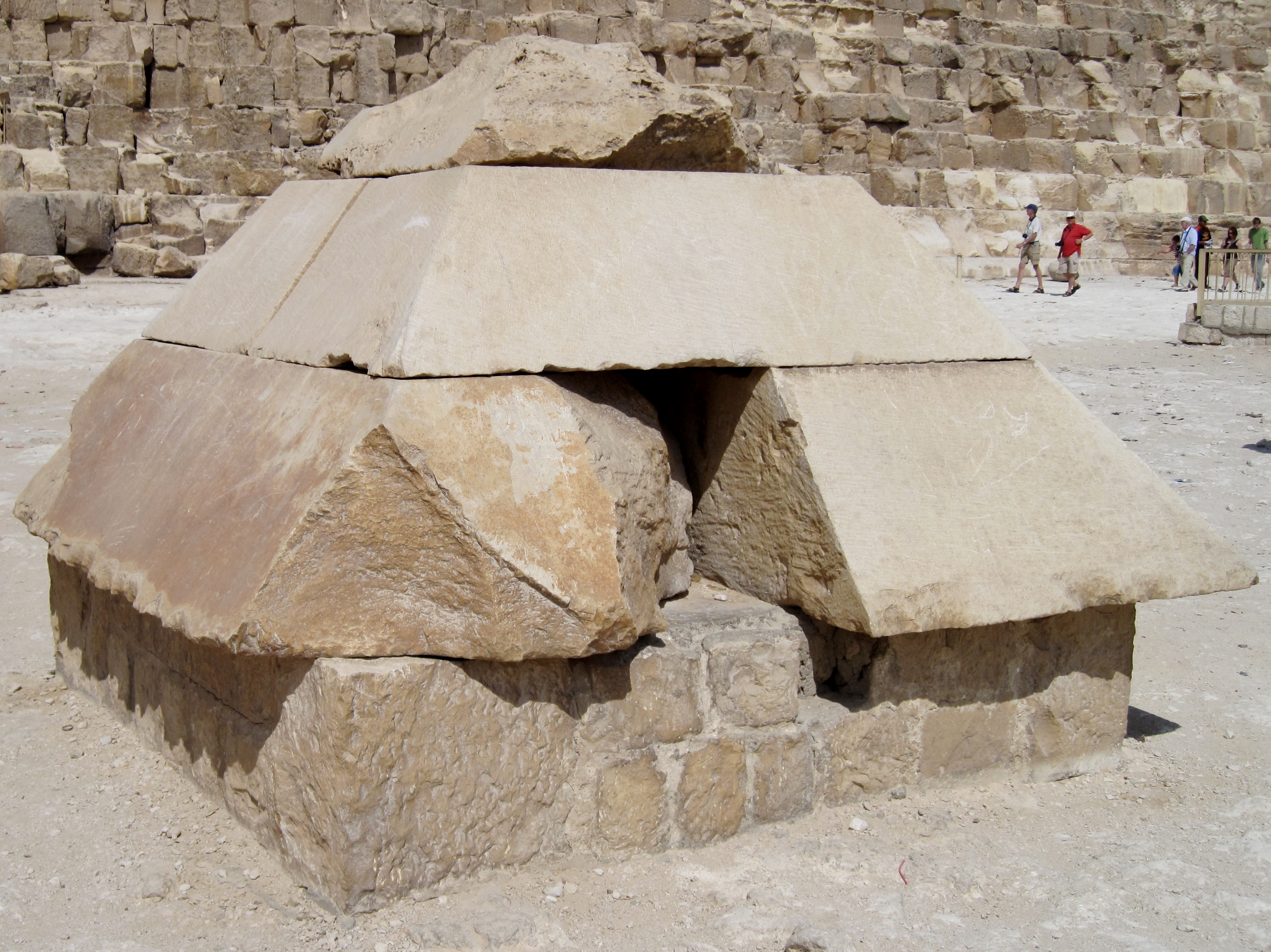 Rekonstruiertes Pyramidion an der Südostseite der Cheops-Pyramide auf dem Giseh-Plateau bei Kairo, Ägypten